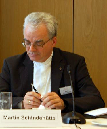 Martin Schindehütte, Vizepräsident des Kirchenamtes der Evangelischen Kirche in Deutschland (EKD) und Auslandsbischof der EKD, bei der Pressekonferenz der Union Evangelischer Kirchen während der EKD-Synode vom April/Mai 2009 in Würzburg, Deutschland.